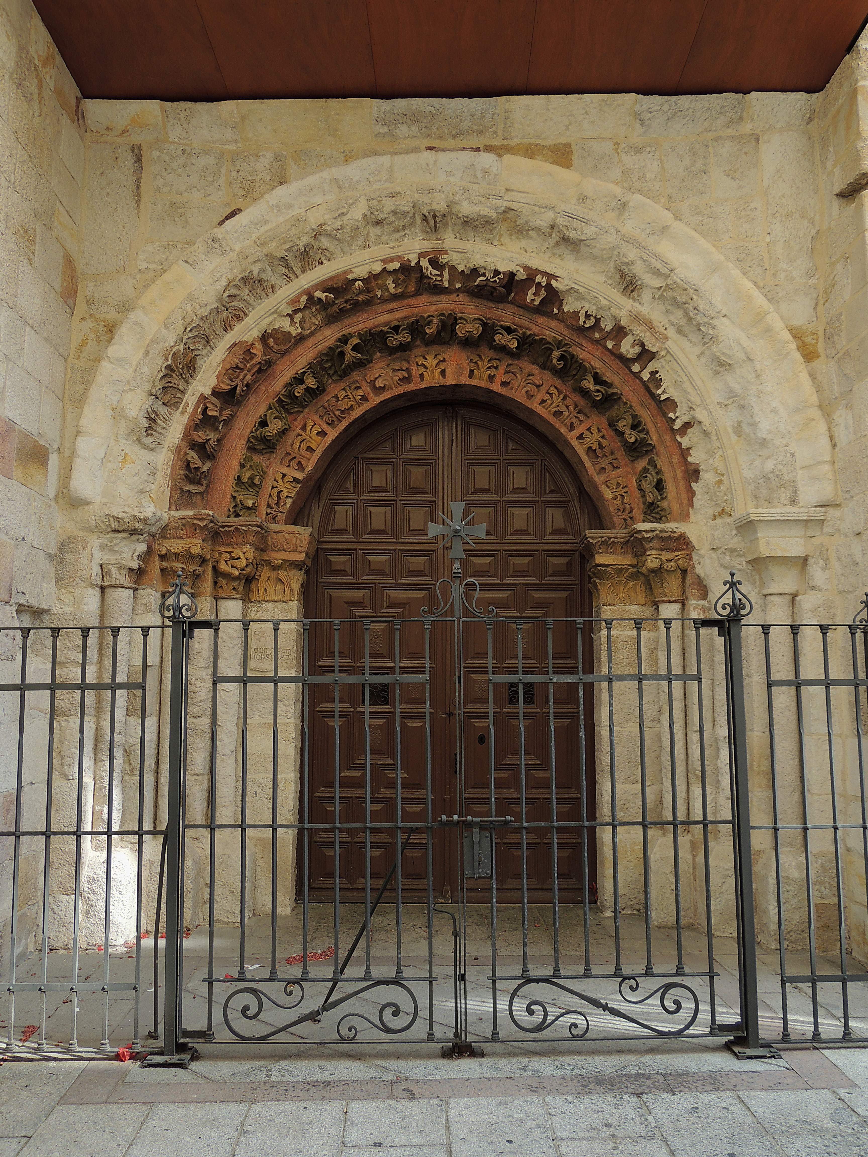 Portada oeste de la iglesia de San Vicente en Zamora